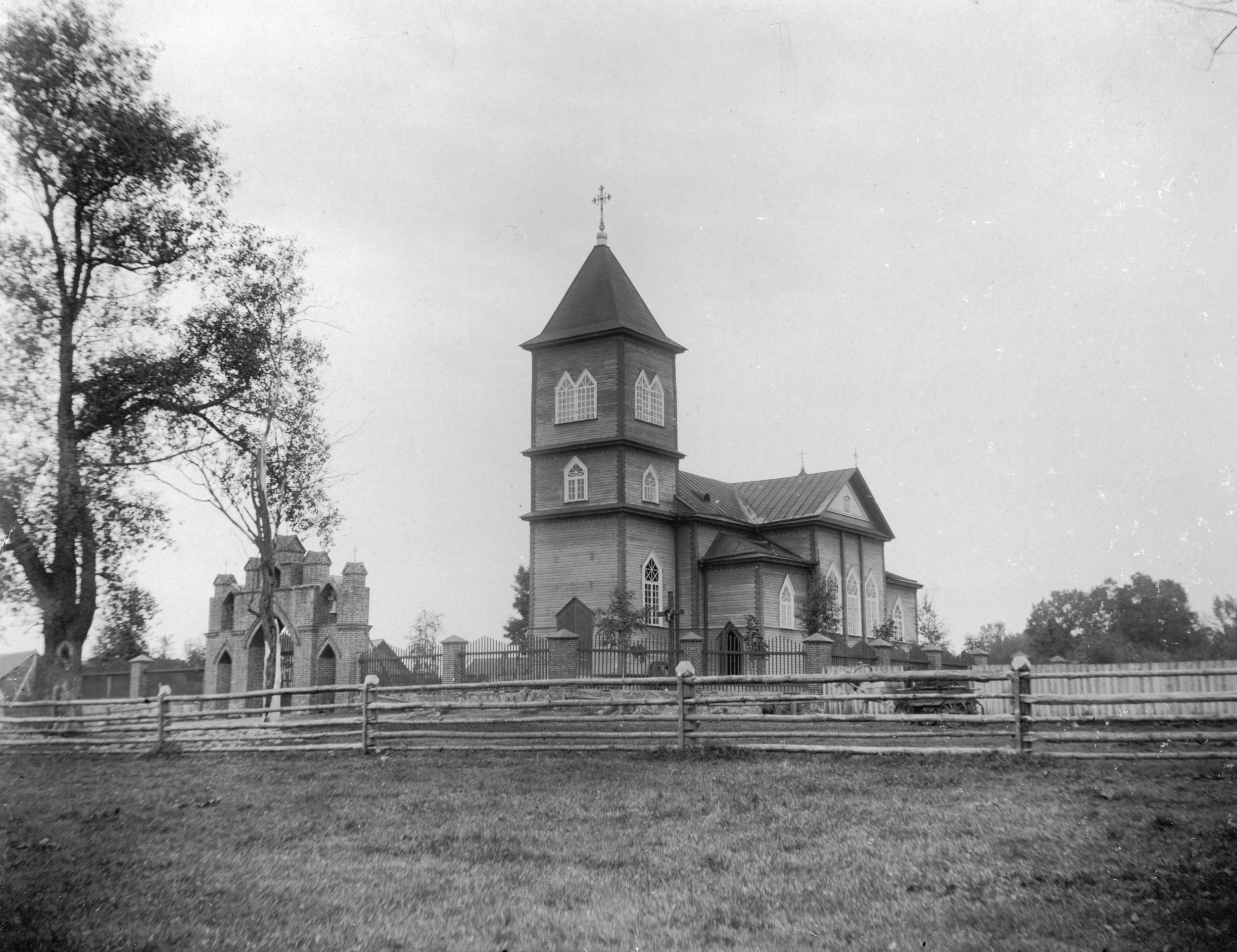 Беларуская (тарашкевіца): Дунілавічы (Duniłavičy), vulica Kaścielnaja (вуліца Касьцельная). Касьцёл Сьвятога Міхала Арханёла, збудаваны замест адабранага расейскімі ўладамі